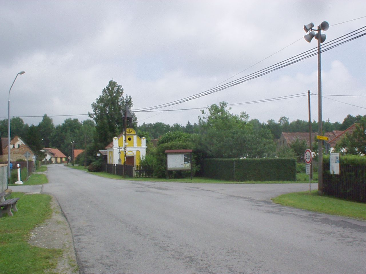 náves v Chobotě, okres Strakonice